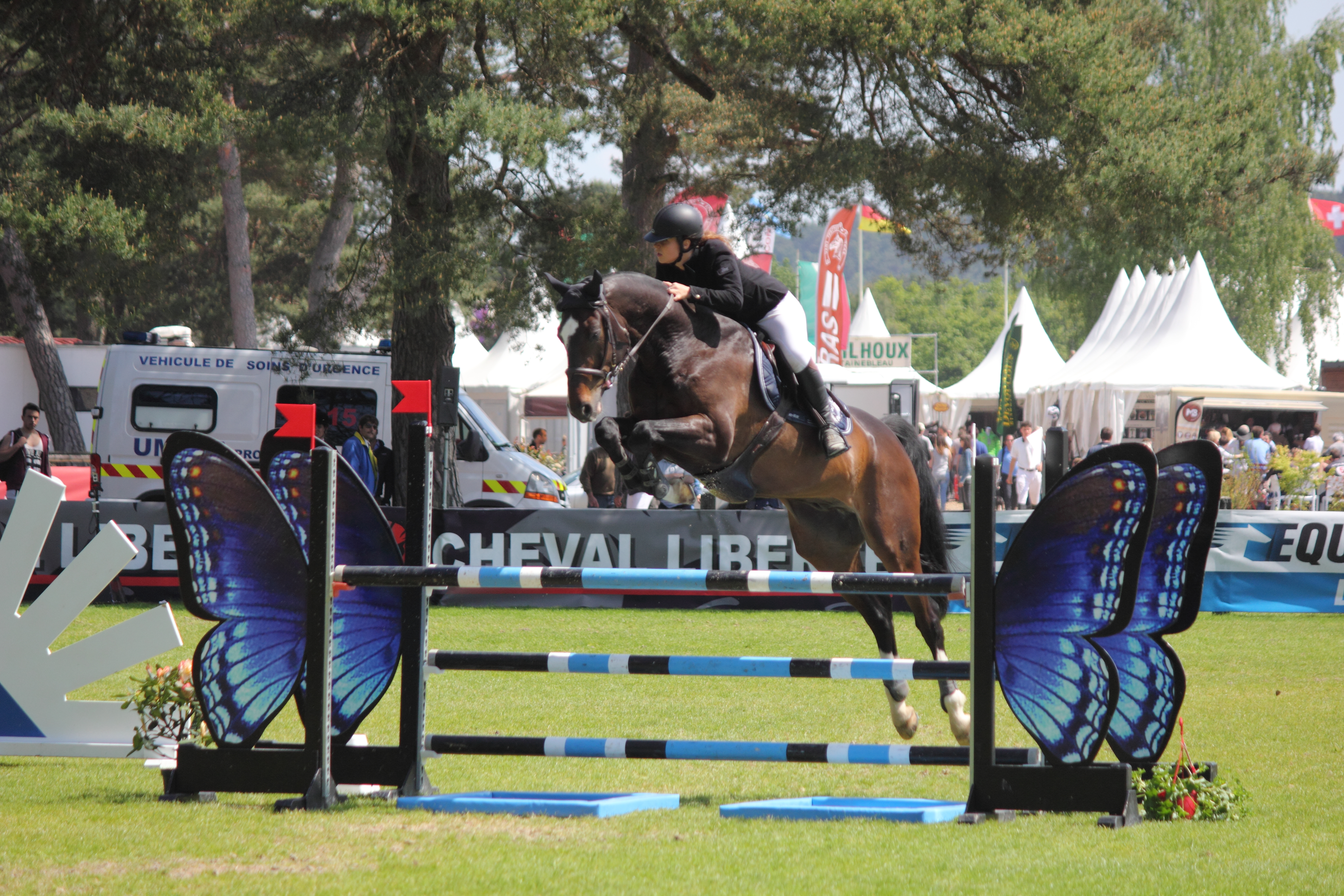 CSO Fontainebleau GP Classic 115 cm